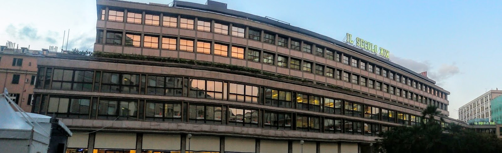 La sede del quotidiano Il Secolo XIX